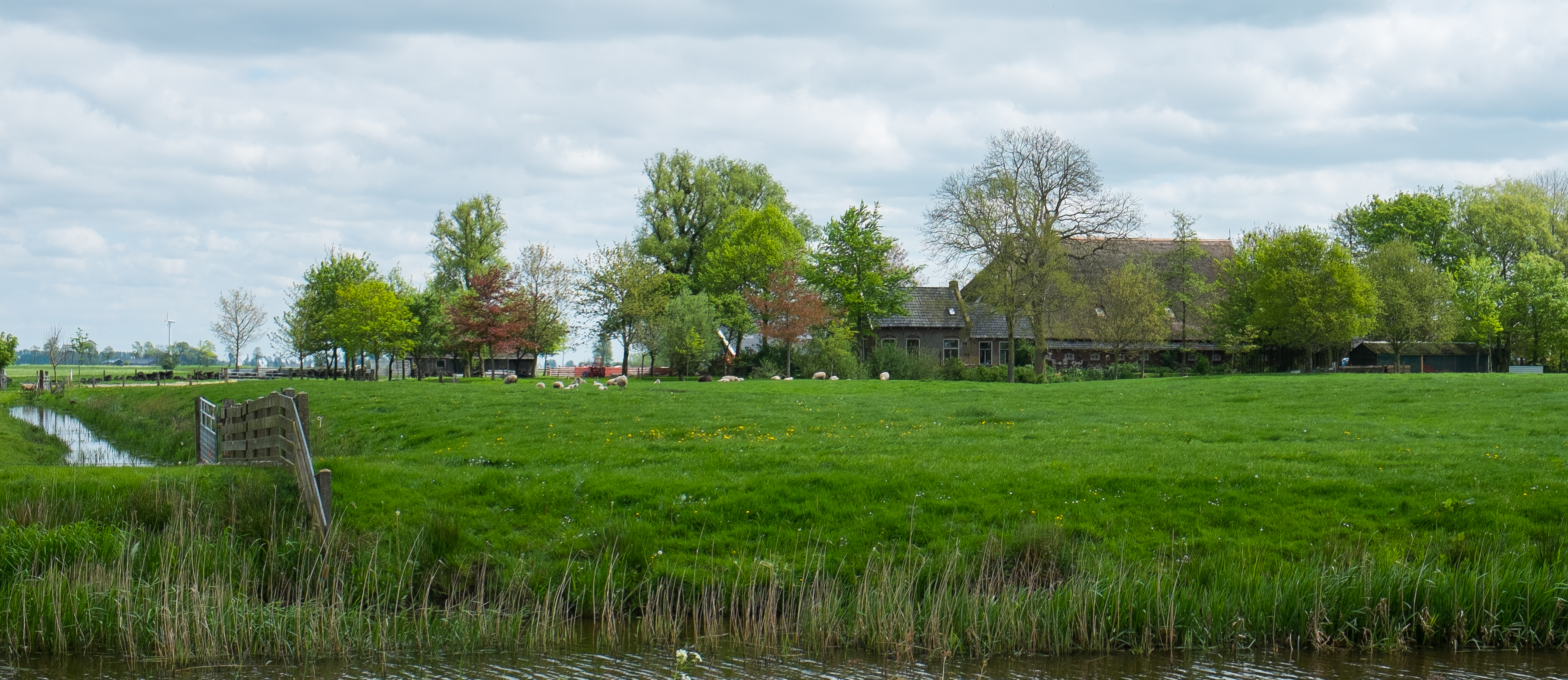 Terrein van de vroegere Clantstate bij Augsbuurt. Het betreft het stuk grasland waar de schapen oplopen (niet zichtbaar is de scheidingssloot met het stuk grasland op de voorgrond) en dat verder doorloopt naar rechts; voor de boerderij langs.